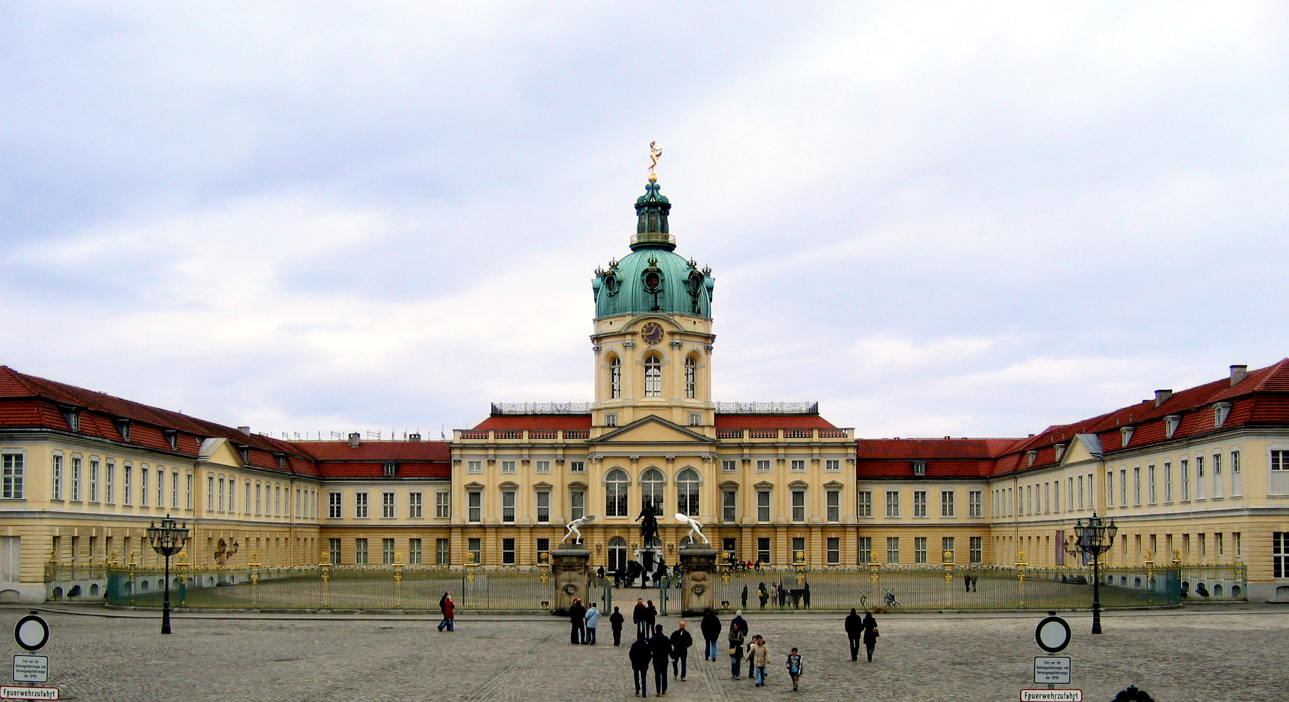 Source: from German Wikipedia [1] Fotograf: Richardfabi Ort: Berlin Beschreibung: Schloss Charlottenburg Lizenz: Selbst fotografiert, PD-self